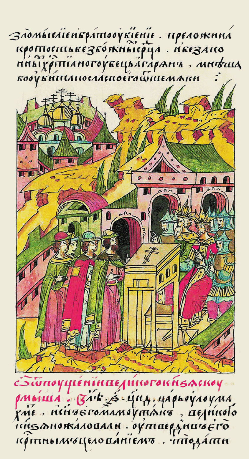 Об освобождении великого князя из Курмыша. В 6954 году царь Улу-Махмет и его сын Мамутяк пожало- вали великого князя: заставили его прине- сти клятву на кресте, что даст 84 и отпустили его из Курмыша на Покров Пресвятой Богоро- дицы месяца октя- бря в 1 день, а с ним князя Михаила и всех остальных, сколько их с ними было. И отпра- вили с ними своих по- слов — многих князей со многими людьми, князя Сеит-Асана и Утеша, и Кураиша, и Дылхозю, и Адара, и многих других. за себя выкуп, сколько может